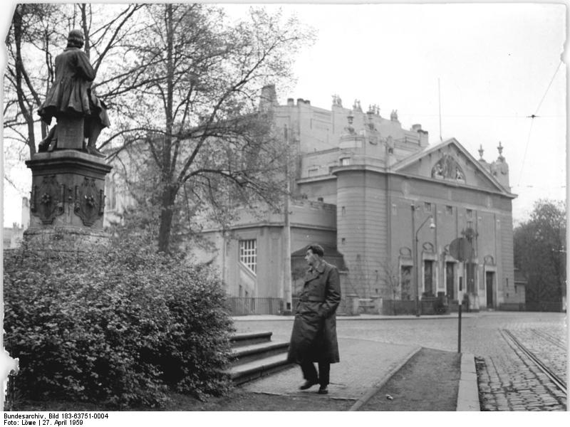 Görlitz, Boehme-Denkmal, Stadthalle Zentralbild Löwe Vgt-Noa 27.4.1959 Vorbereitendes Material: Europäische Gewerkschaftskonferenz an der Oder-Neiße-Friedensgrenze Internationale und nationale Gewerkschaftsorganisationen verschiedenster Weltanschauung und Richtung fast aller europäischen Länder sind zur Teilnahme an der Internationalen Konferenz der Gewerkschaften und Werktätigen Europas für einen Friedensvertrag mit Deutschland, für Abrüstung und für das Verbot der Atomwaffen vom 8. bis 10. Mai in Görlitz eingeladen worden. (Näheres siehe ADN-Meldung Nr. 216 v. 23.4.1959) UBz: Das Tagungslokal, die Stadthalle, links das Denkmal des Görlitzer Schuhmachers und Philosophen Jakob Boehme.